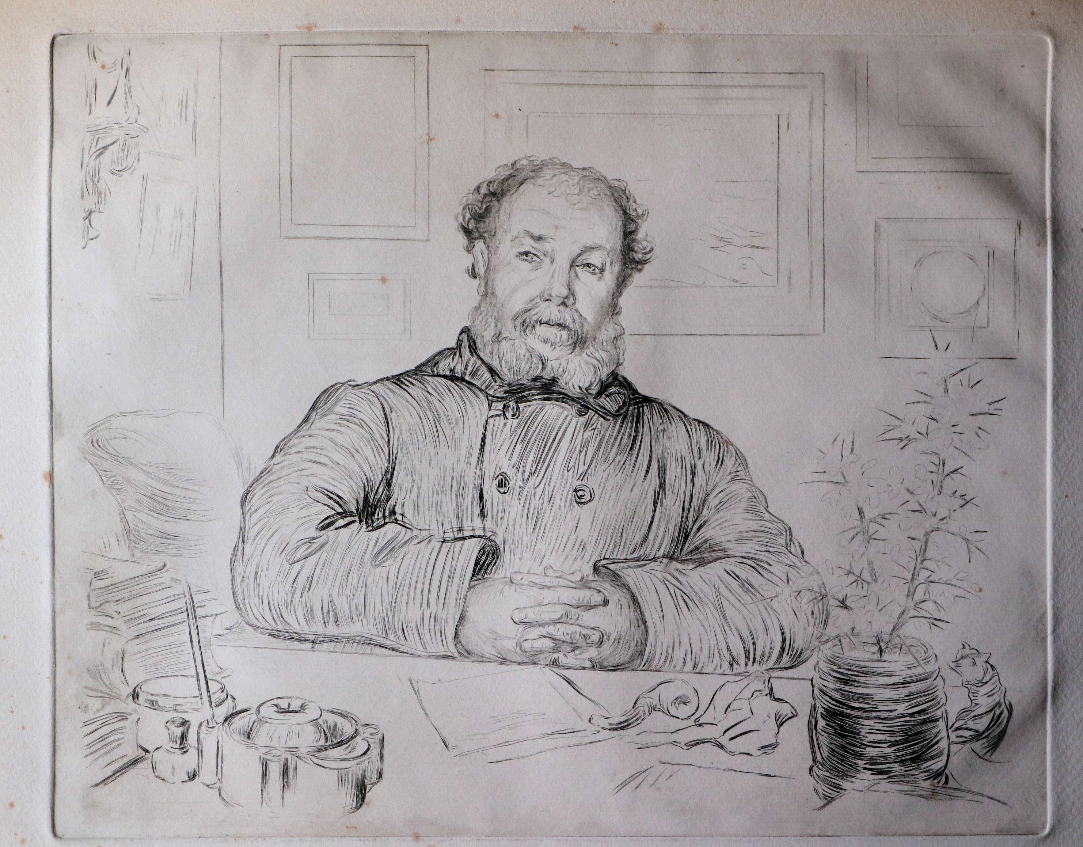 Portrait de Charles Le Goffic installé à son bureau. Eau-forte monochrome.